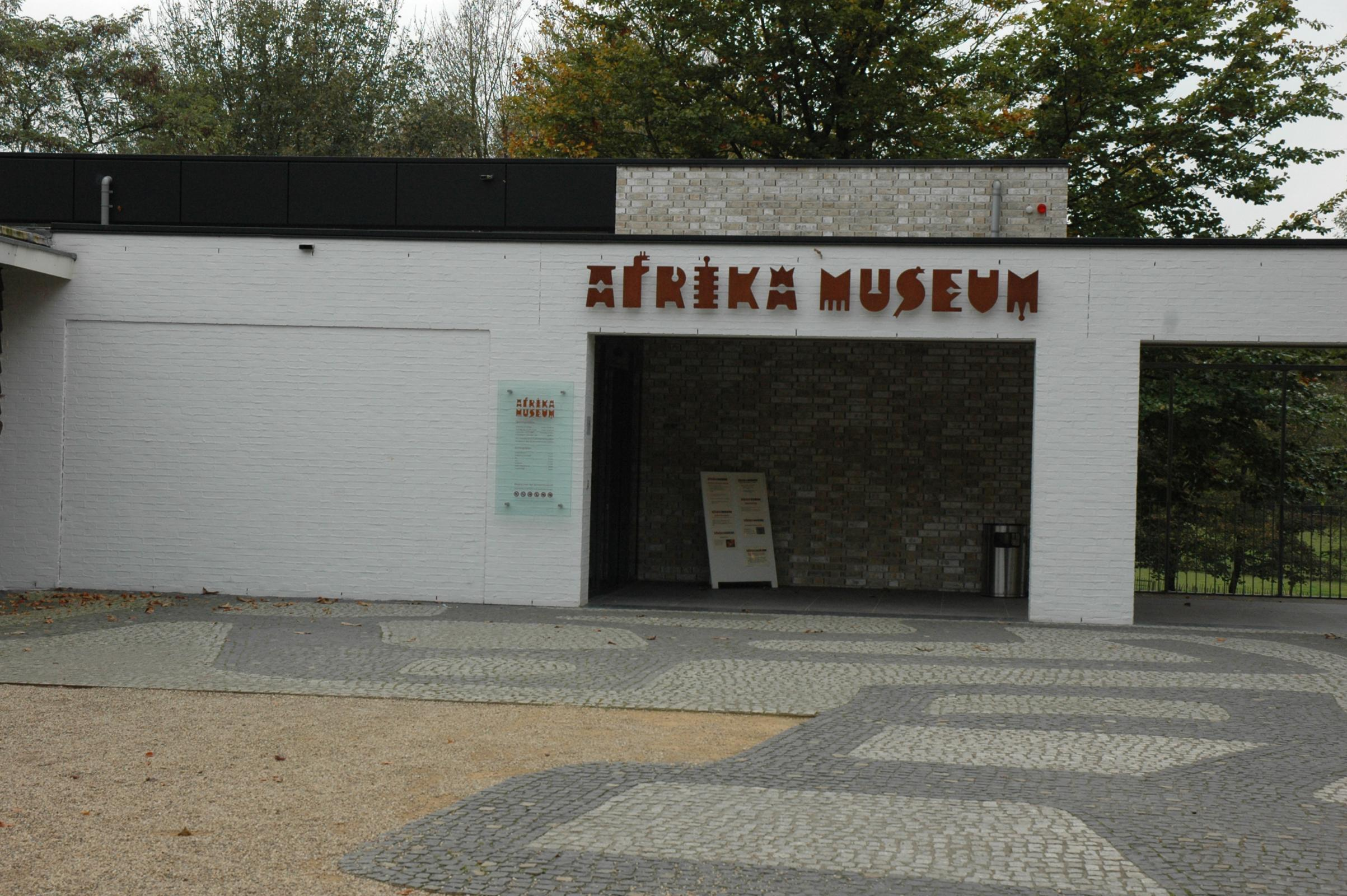 Zicht op een deel van het Afrika museum in Berg en Dal